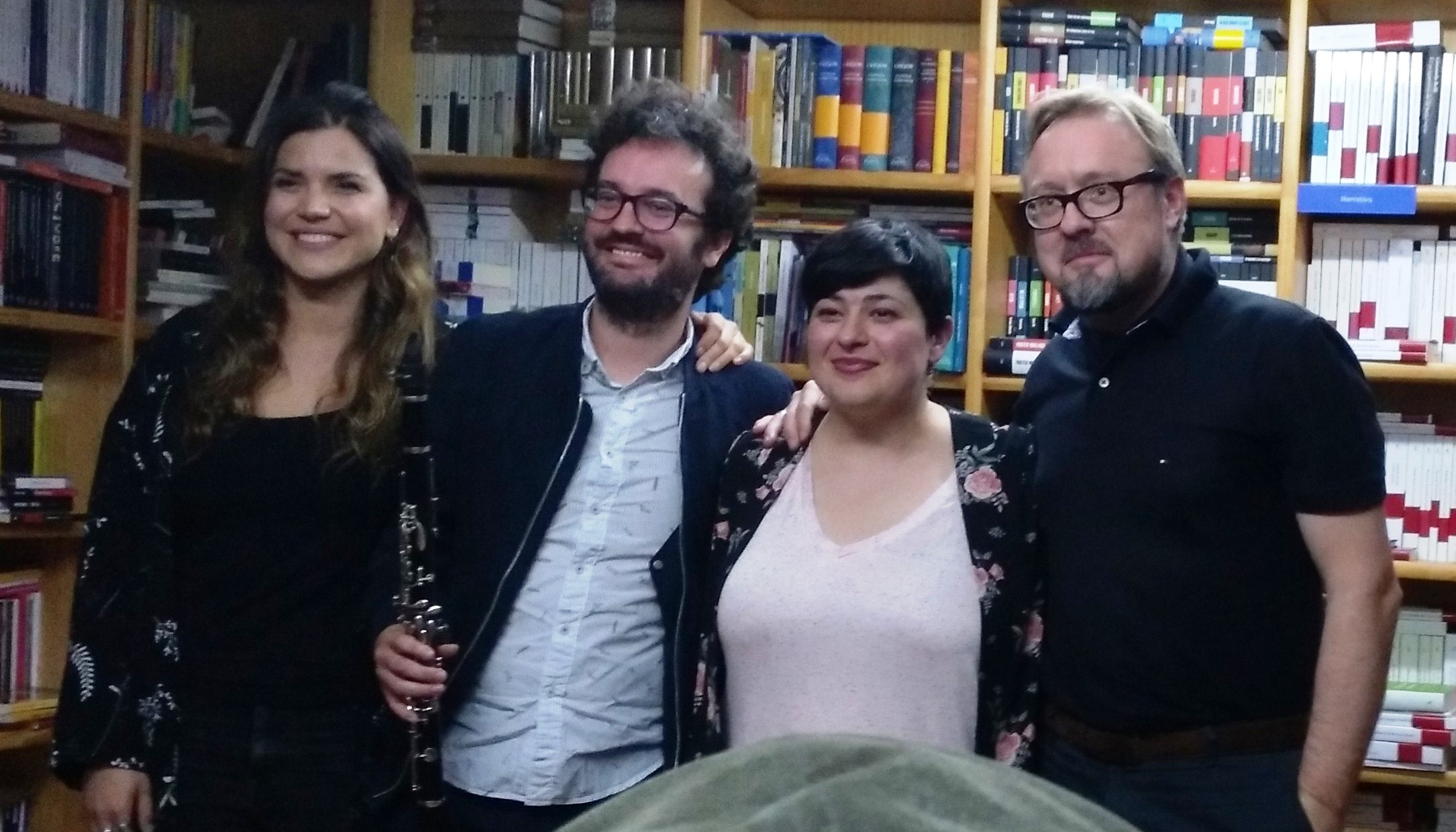 "Teñamos a poesía en Paz" con Baldo Ramos e Lorena Conde. Acompañan a Lorena Inés Salvado e Sergio Piñeiro. Libraría Paz de Pontevedra, 31/05/2018